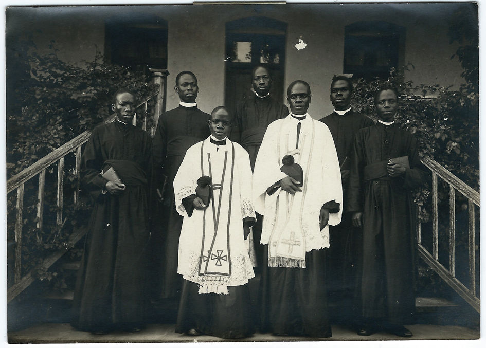 Prêtres ougandais vers 1915-1920.